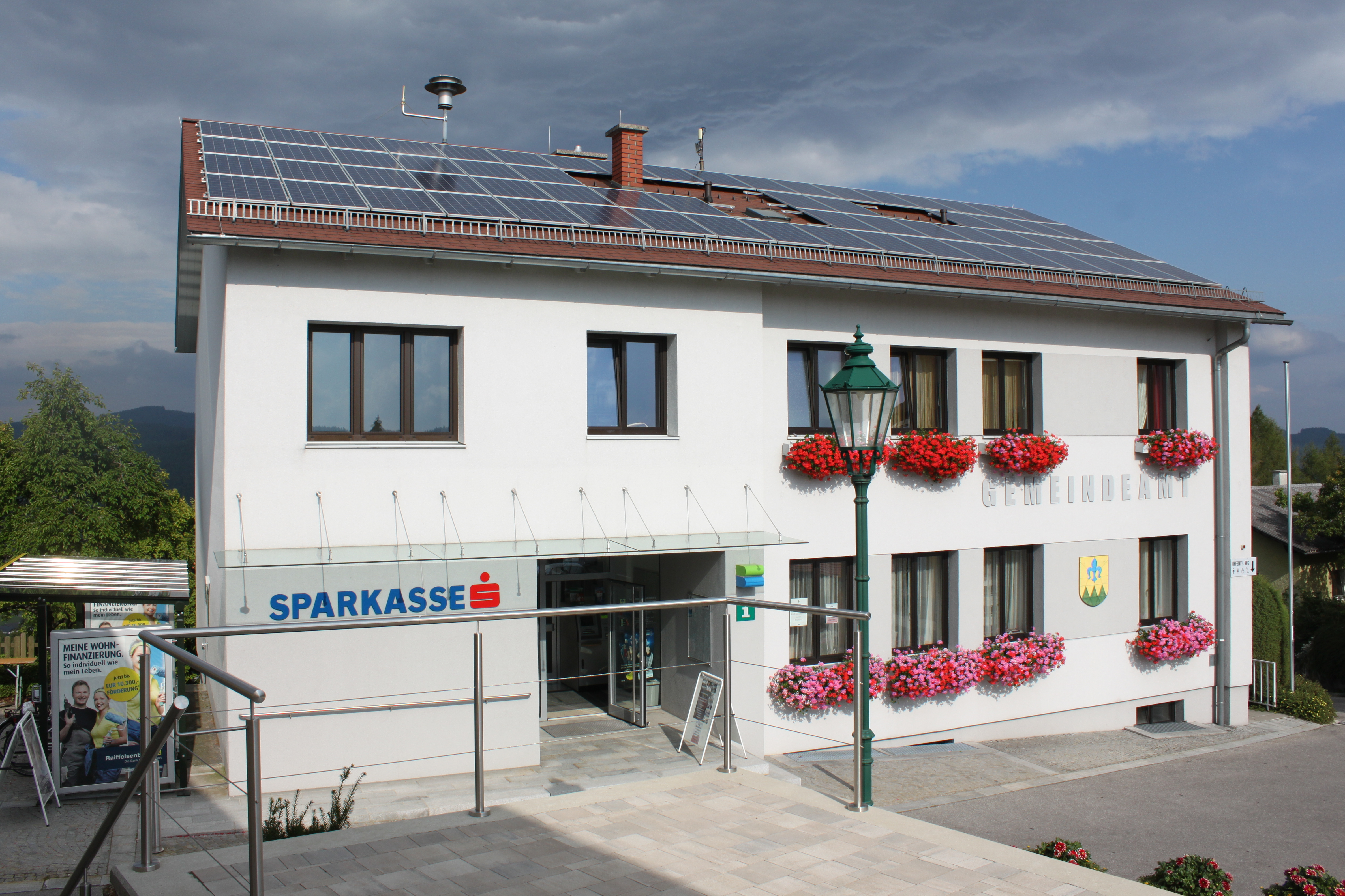 Gemeindeamt Kaltenberg neben der Wallfahrtskirche